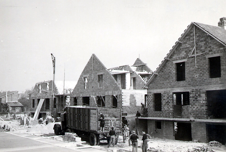 Chantier de construction des pavillons mitoyens des "Grillons de l'île de France" les Castors d'Antony en 1954